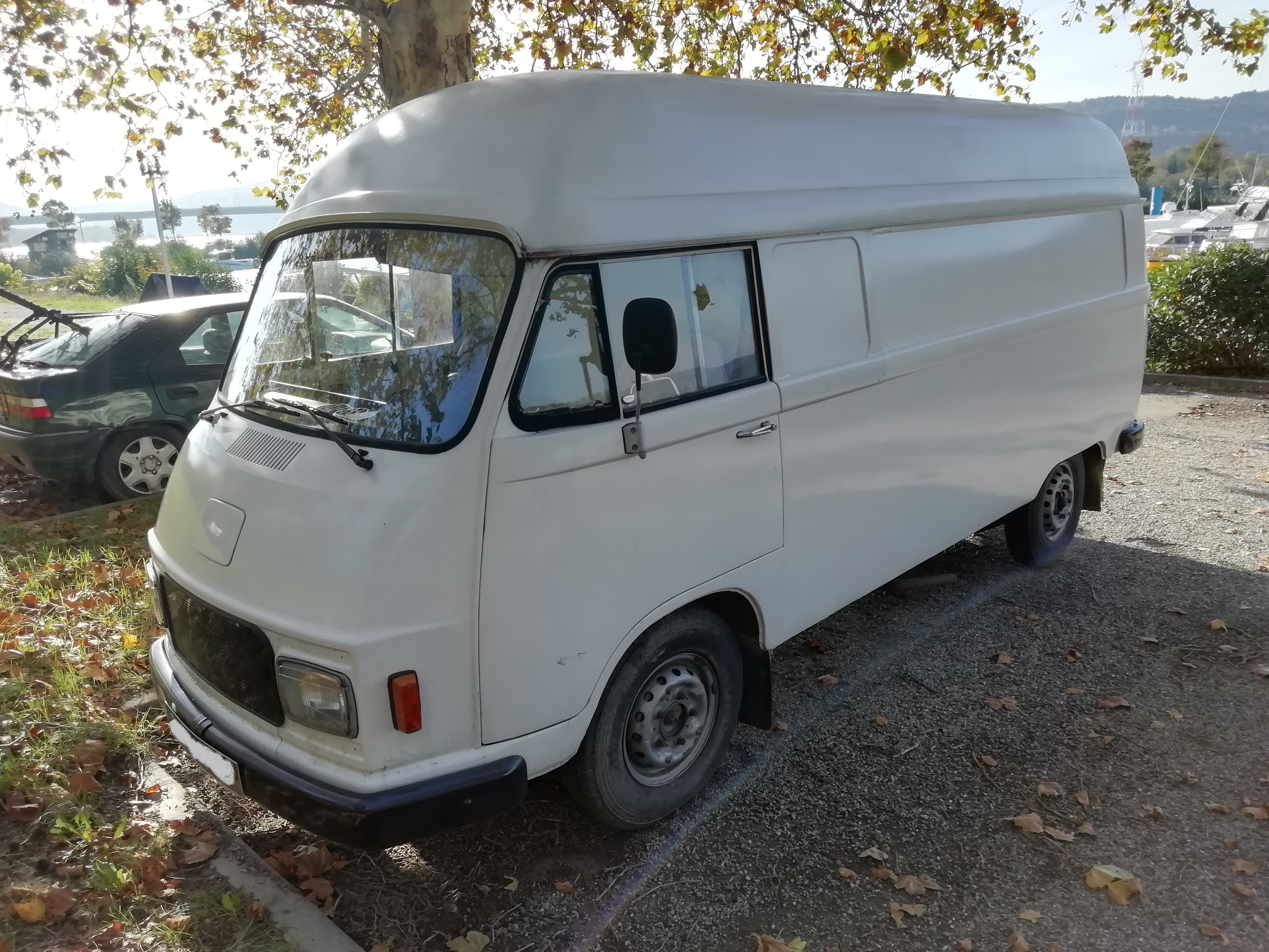 Un Harburger Transporter en 2019.